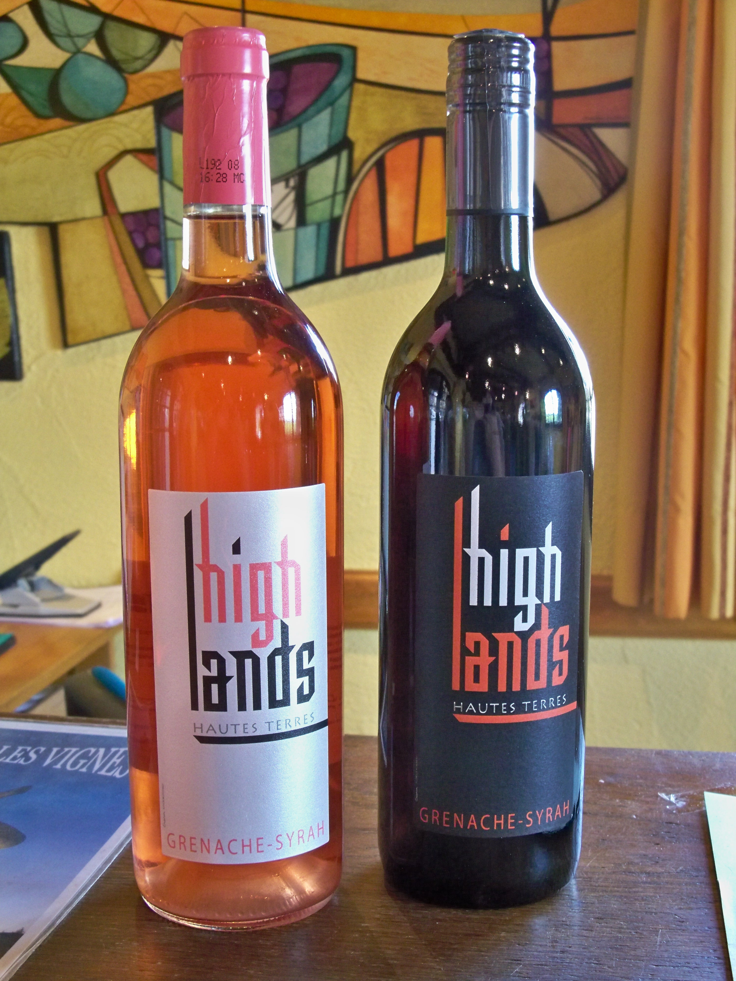 Bouteilles de Côteaux du Tricastin Hautes Terre, Drôme, France